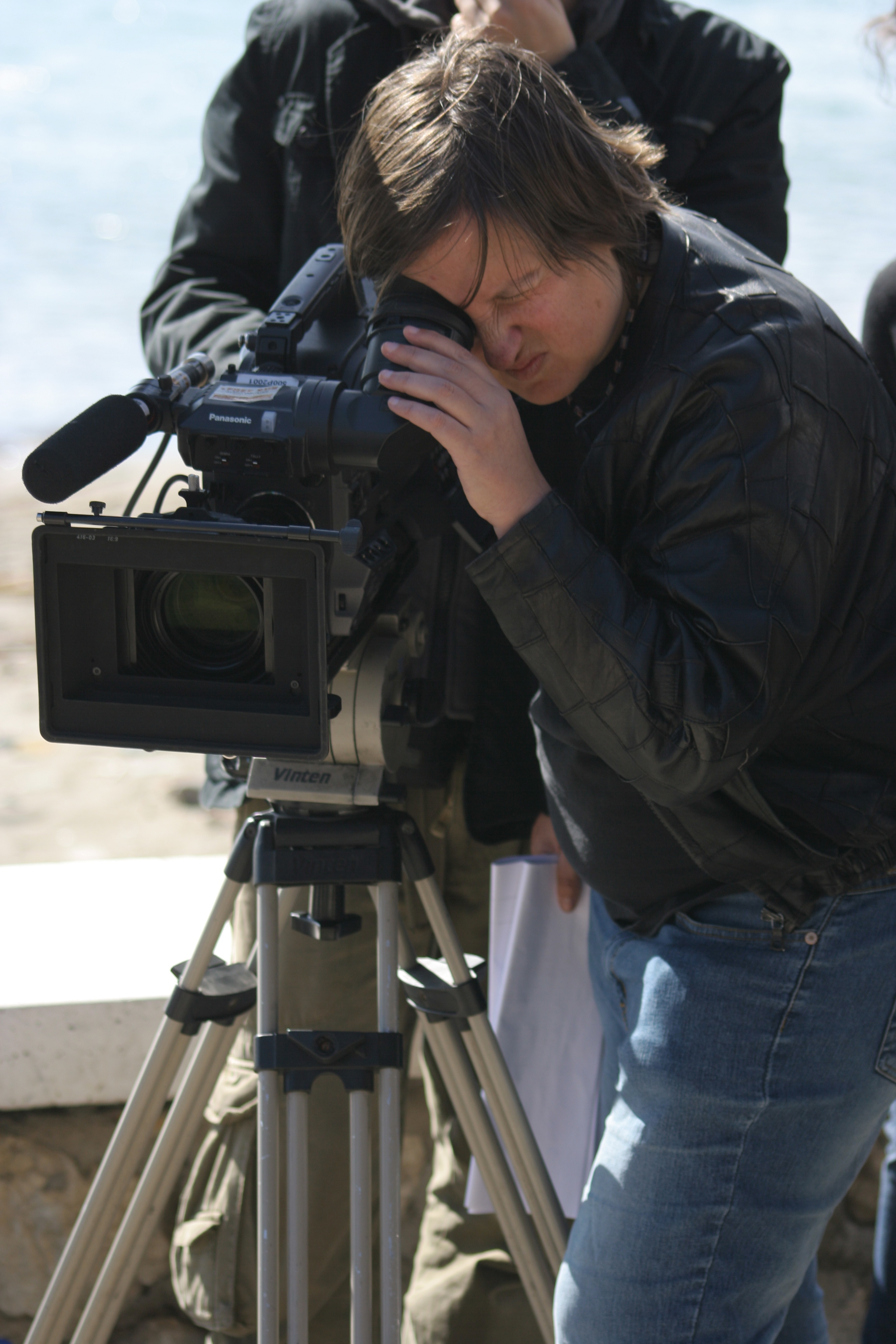 Foto de la directora Ana Torres-Alvarez